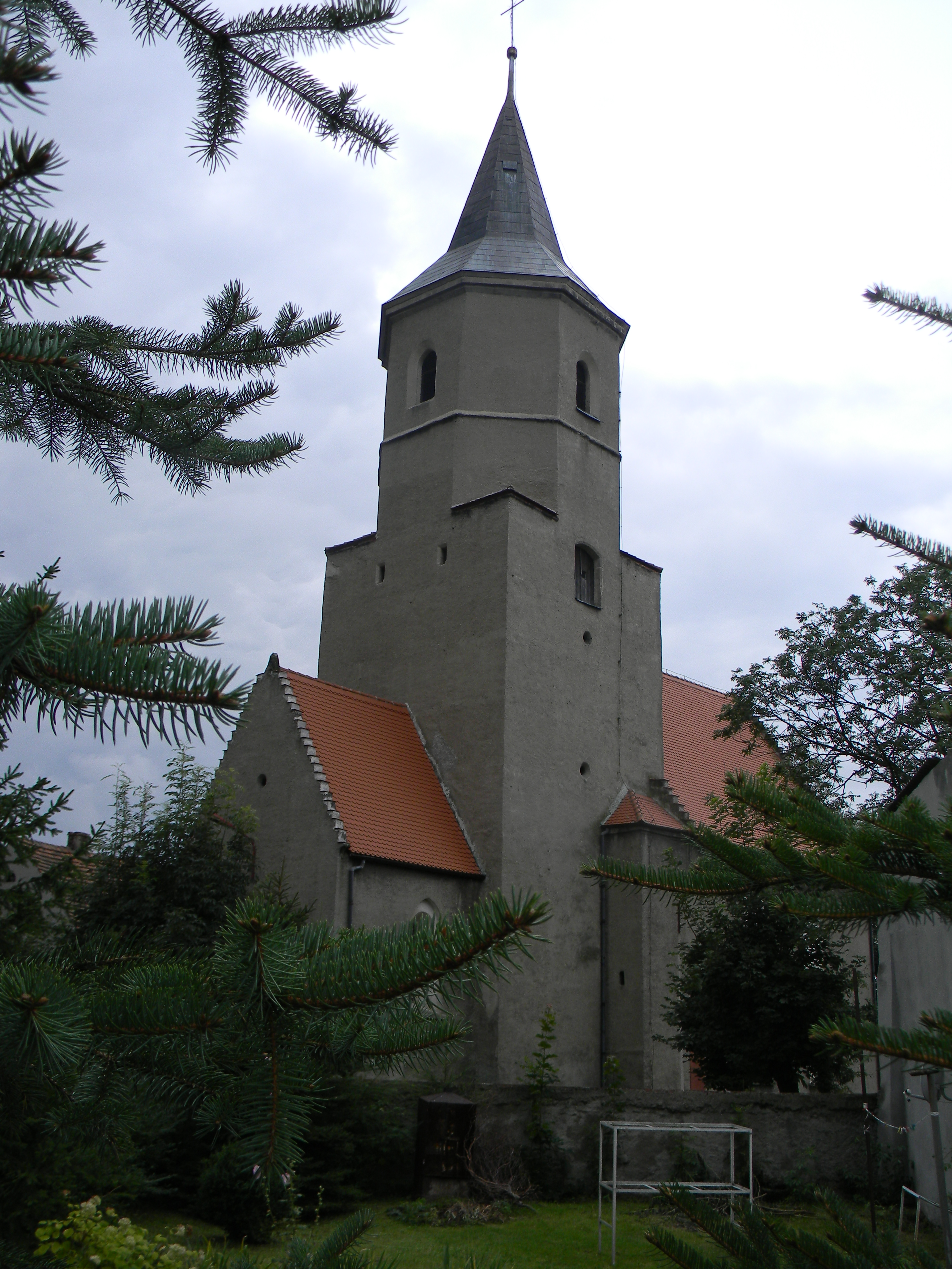 Jerzmanki - kościół parafialny św. Franciszka z Asyżu (zabytek nr 1053 z 25.01.1964)